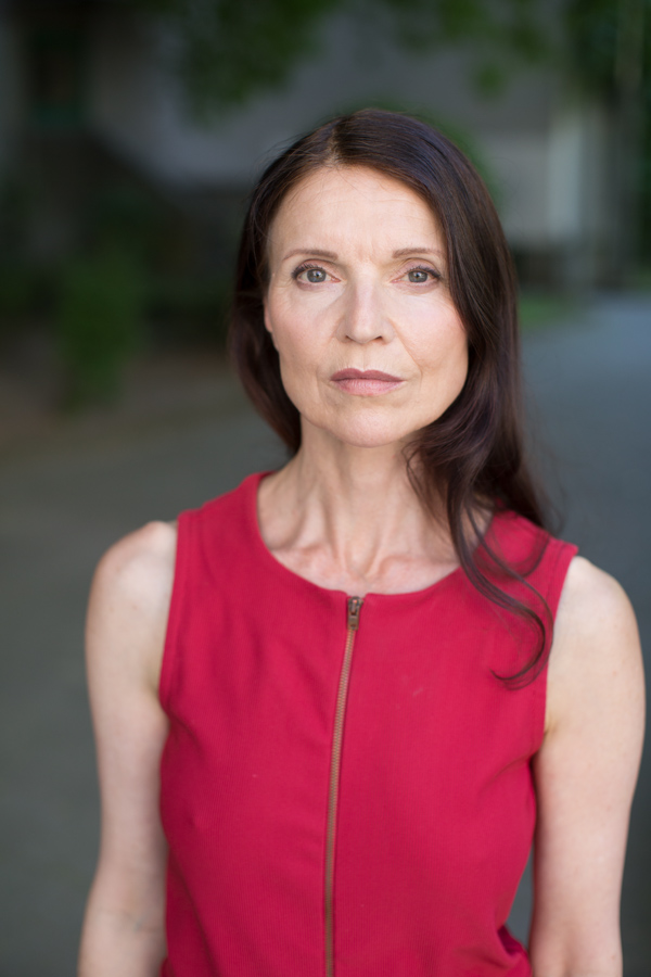 Wiebke Frost